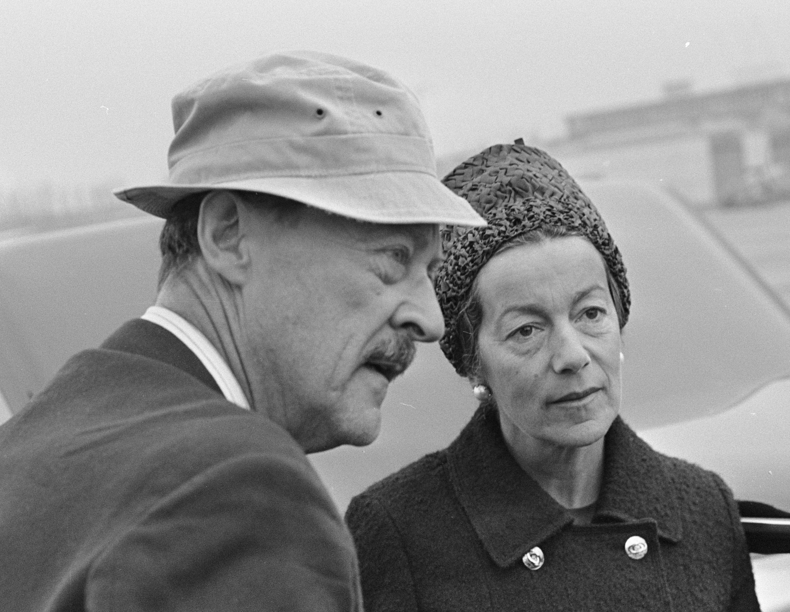 Aankomst prins Aschwin en prinses Simone op Schiphol